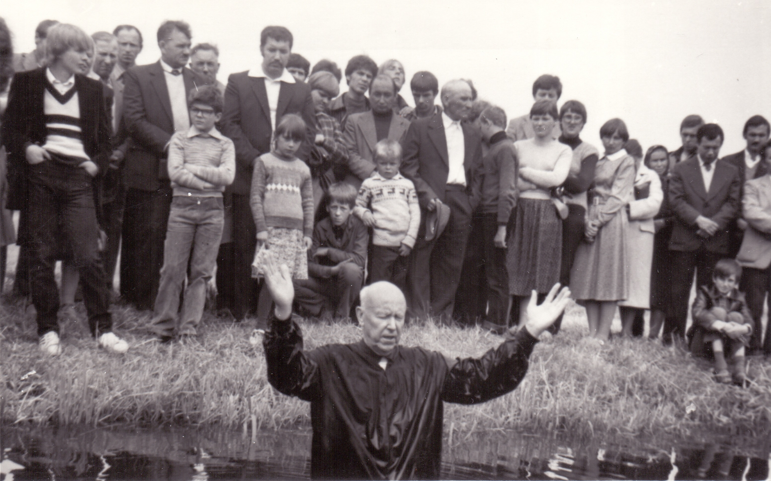 chrzest wodny zboru w Dubiczach Cerkiewnych, nad Orlanką, niedaleko Redut; Teodor Maksymowicz